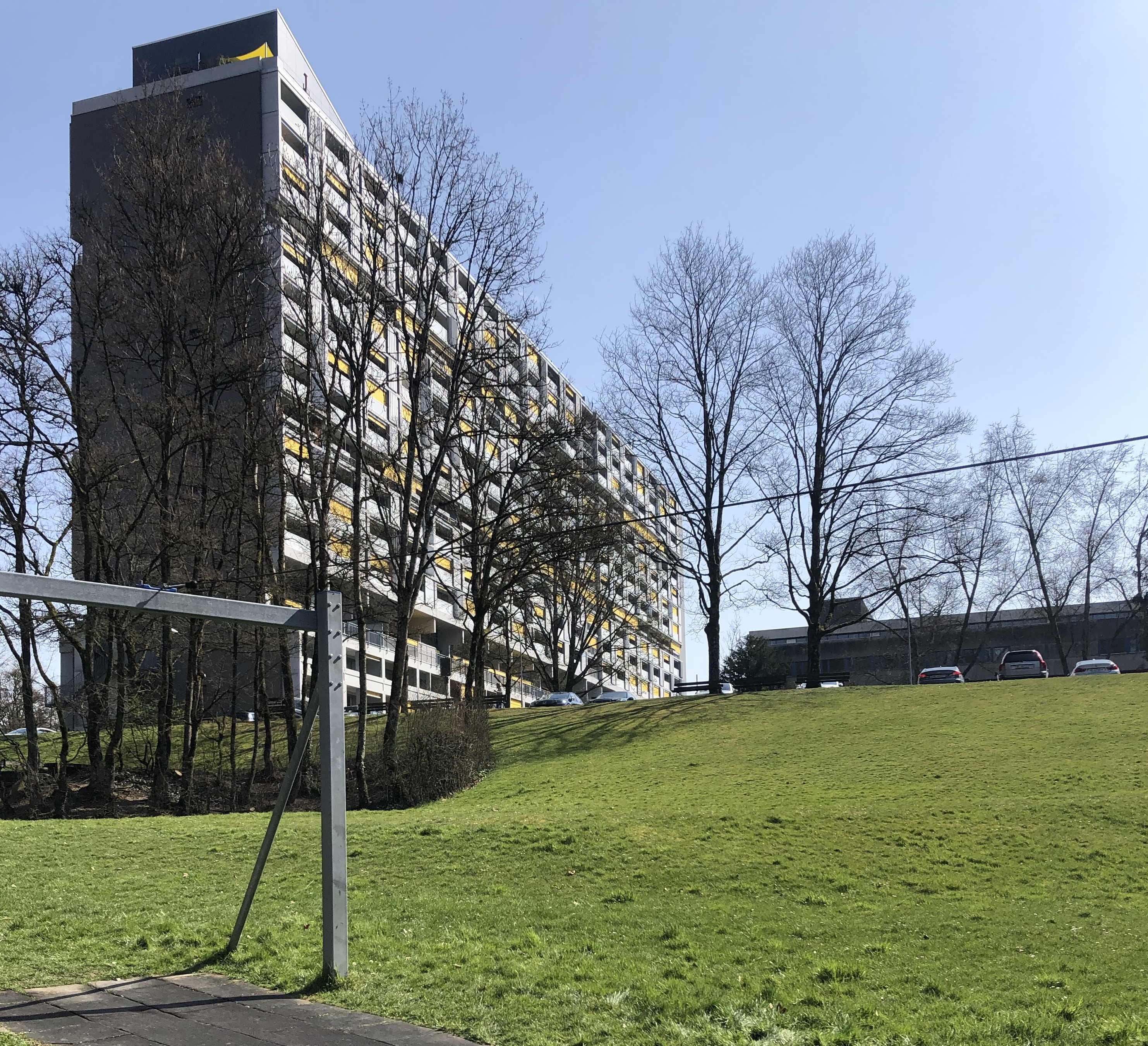 Gäbelbach Hochhausblick vom Tal 1